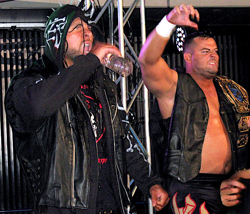 2013年6月22日 大阪大会 DOMINION6.22